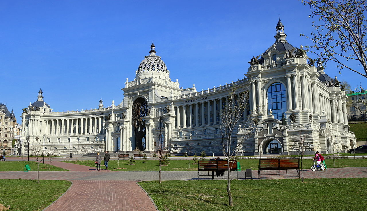 Від на будынак